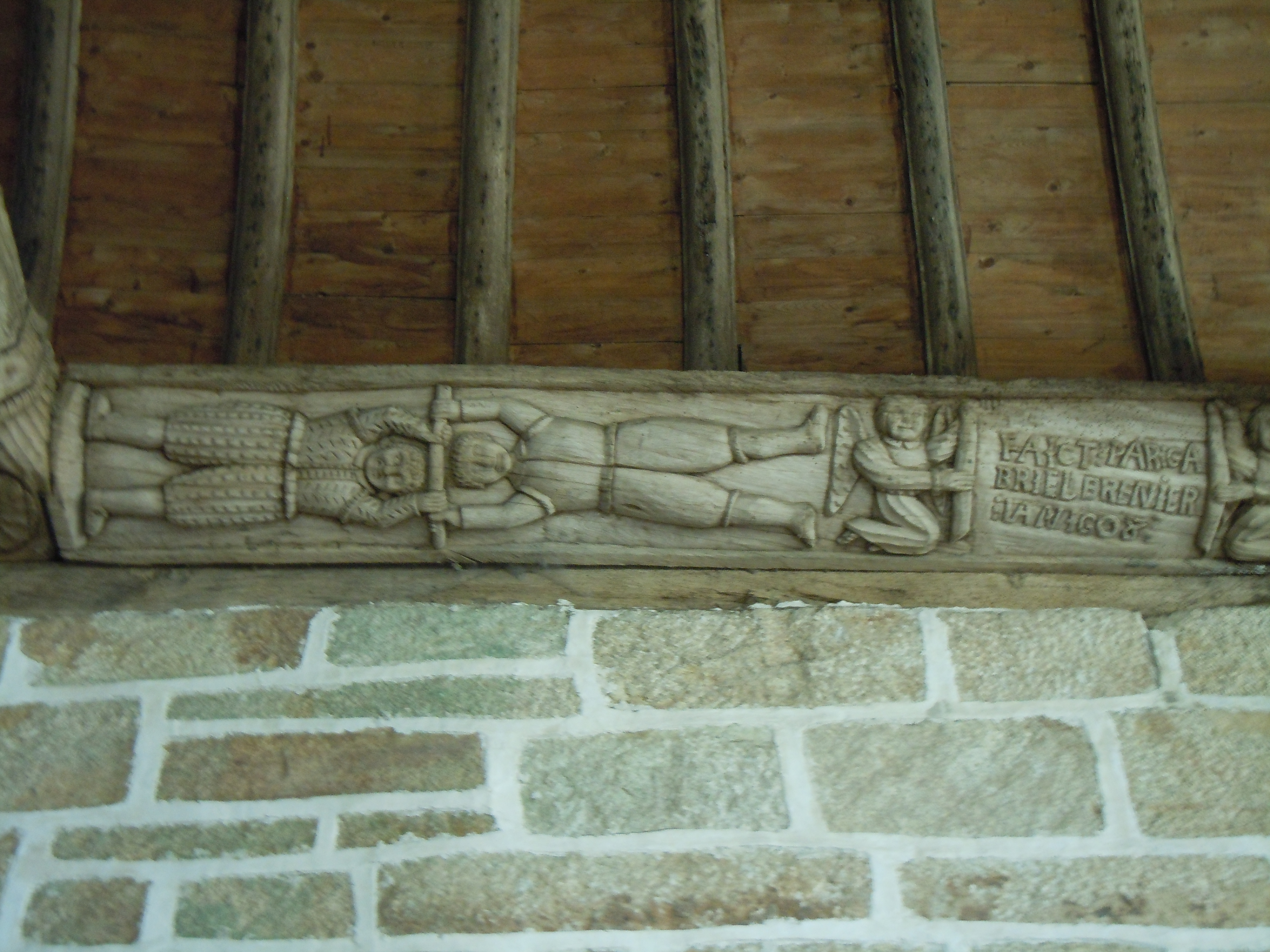 bas relief d'une sablière représentant deux hommes tête-bêche tenant un bâton, à droite est inscrit faict par Gabriel Brenier l'an 1608,chapelle saint-Sébastien, commune du Faouët, France